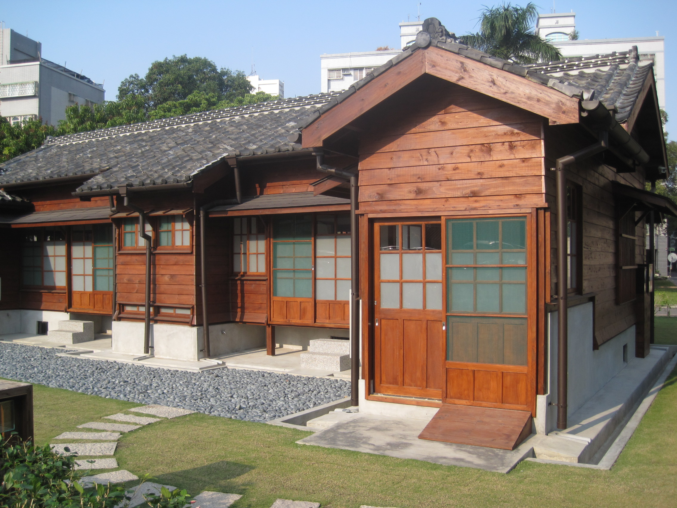 整修後的原臺南州立農事試驗場宿舍